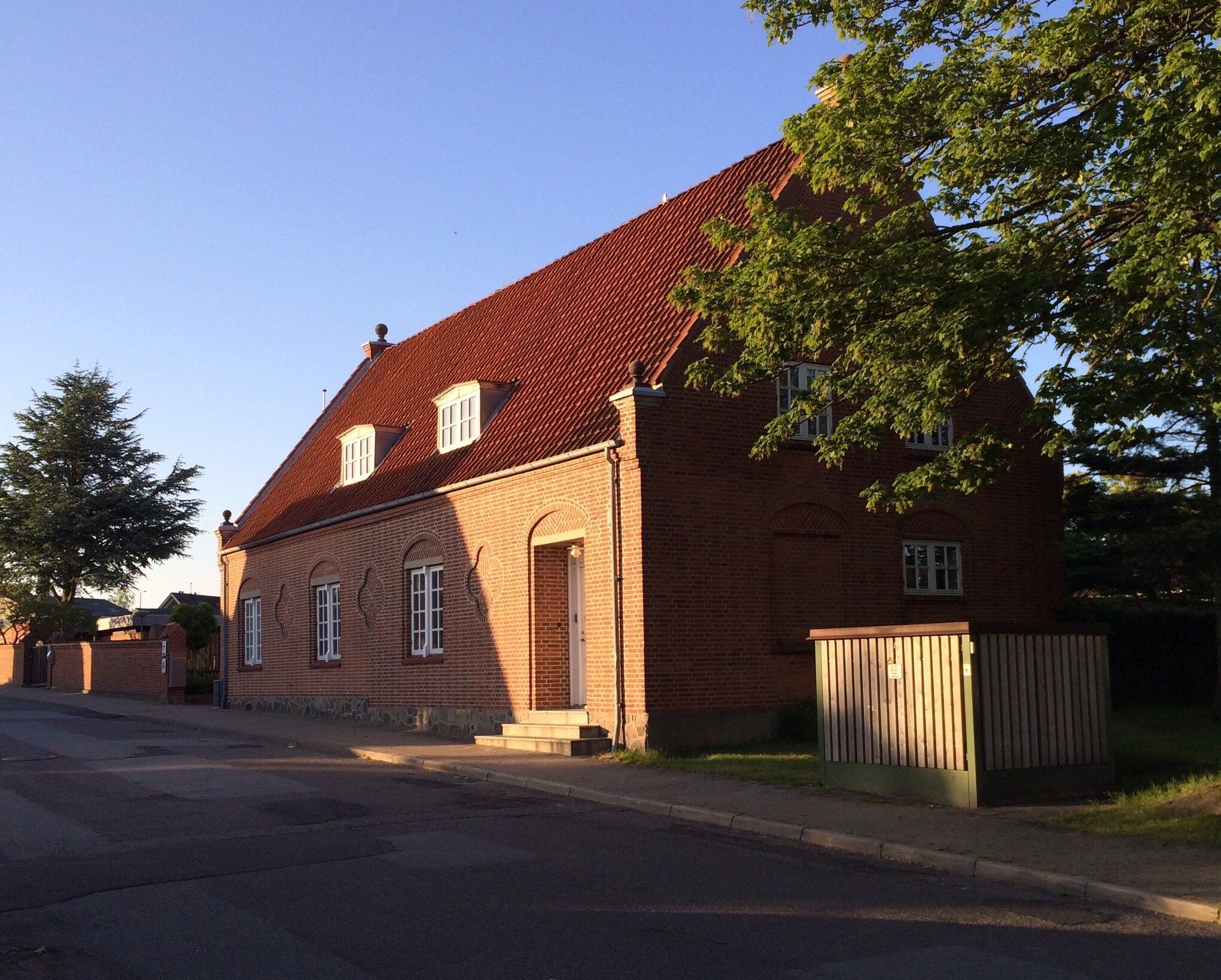 Hadsund Præstegård set fra sydvest